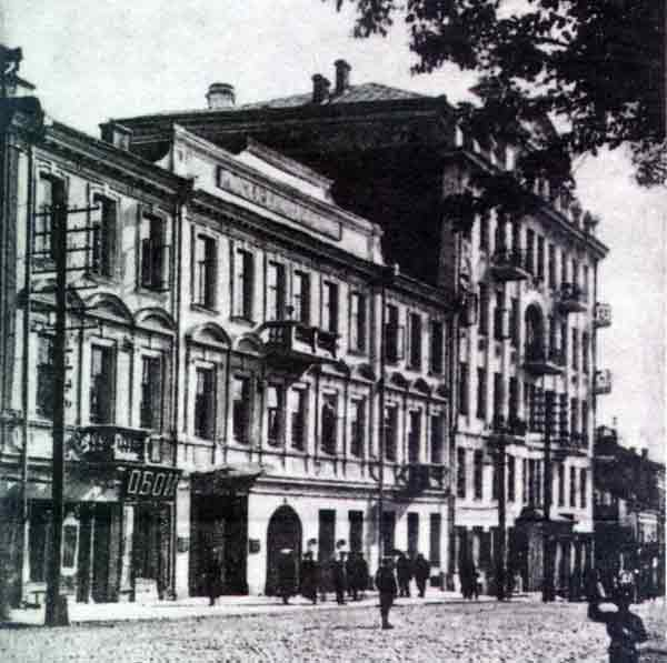 Здание по центру - бывшее здание городского театра. Справа - гостиница "Европа".